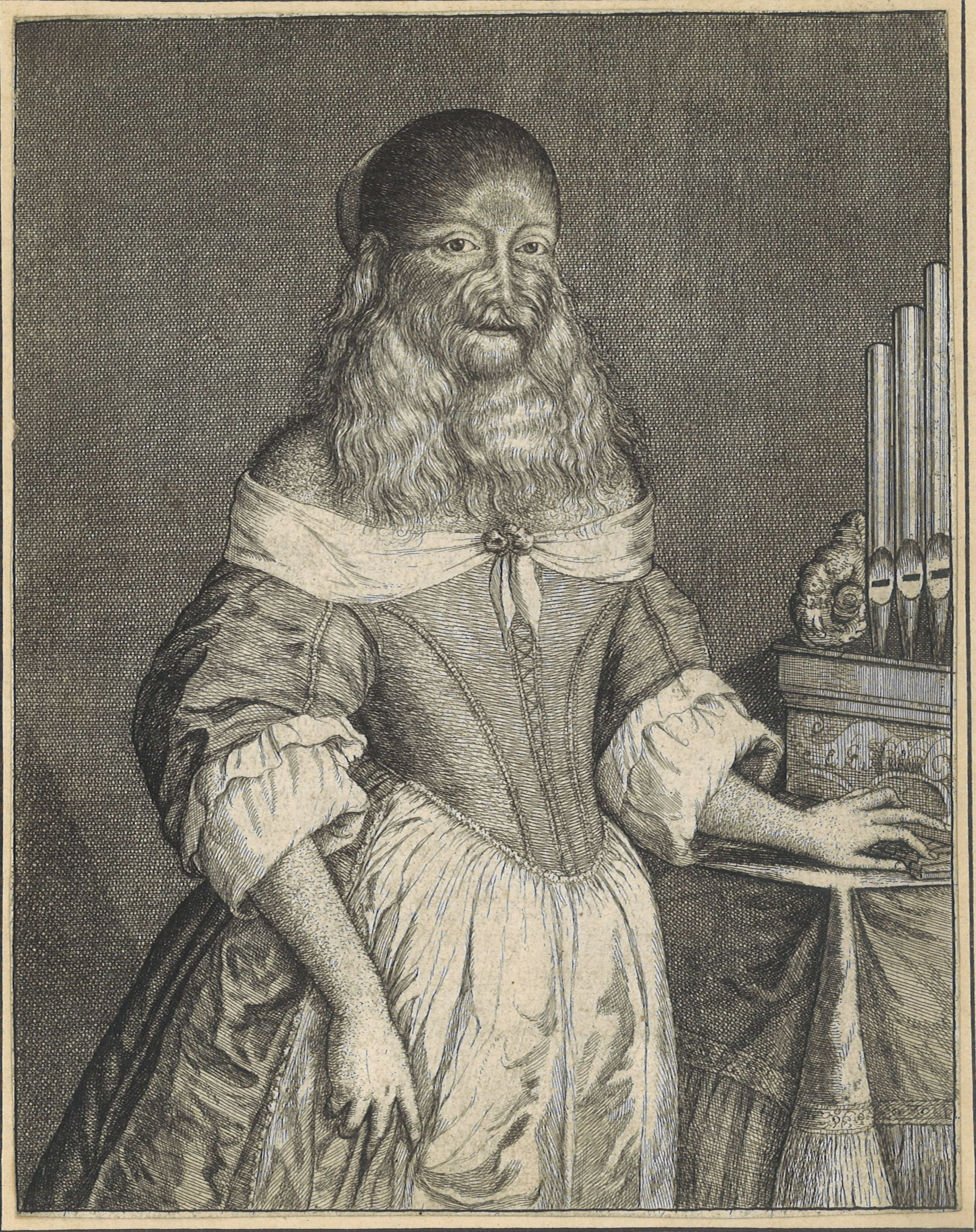 Etching on paper, after Richard Gaywood ( fl. 1650–1680)